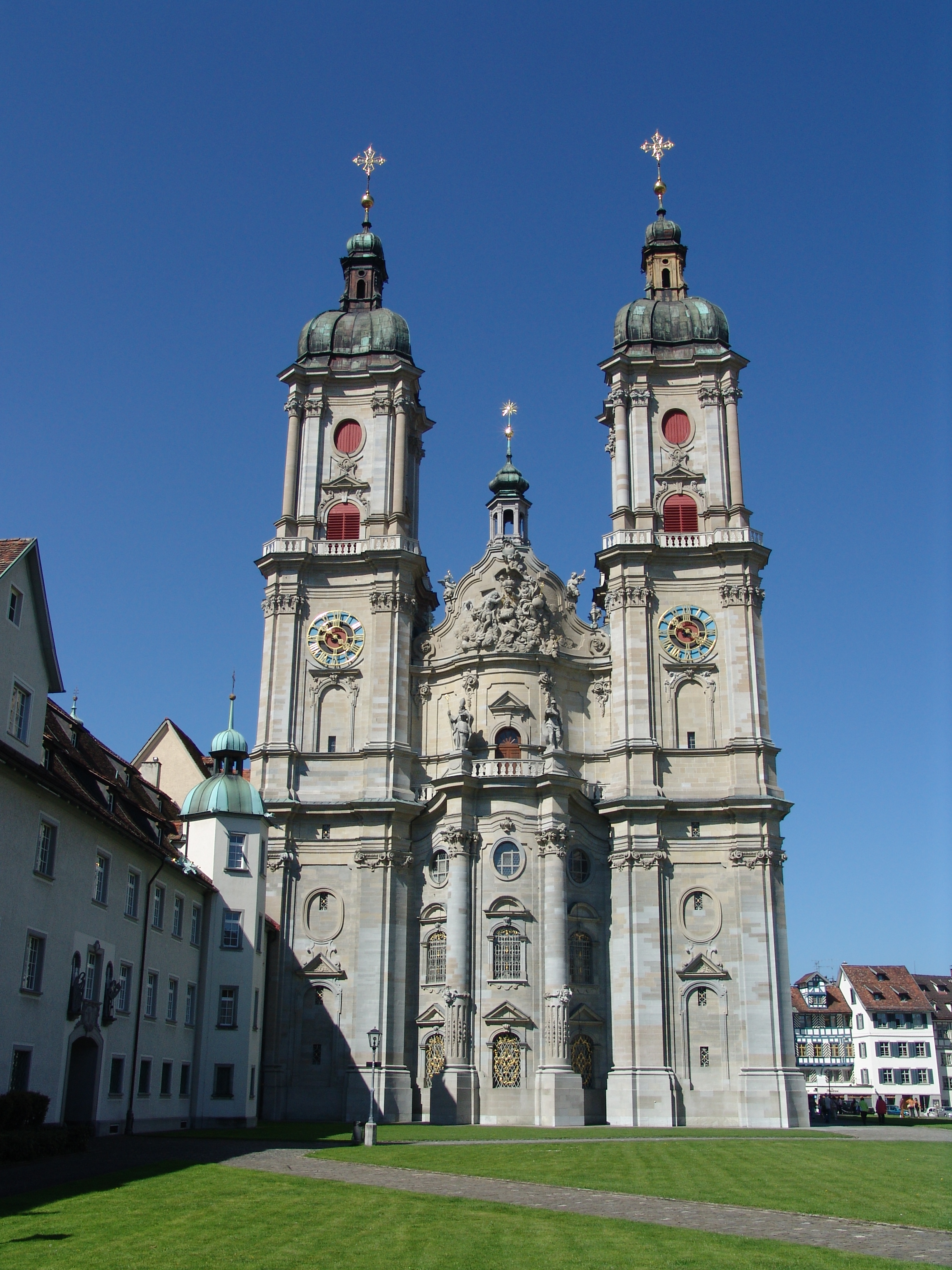 St. Gallen